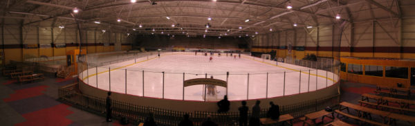 Innenansicht des Dunedin Ice Stadium in Dunedin